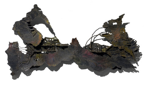 drachen